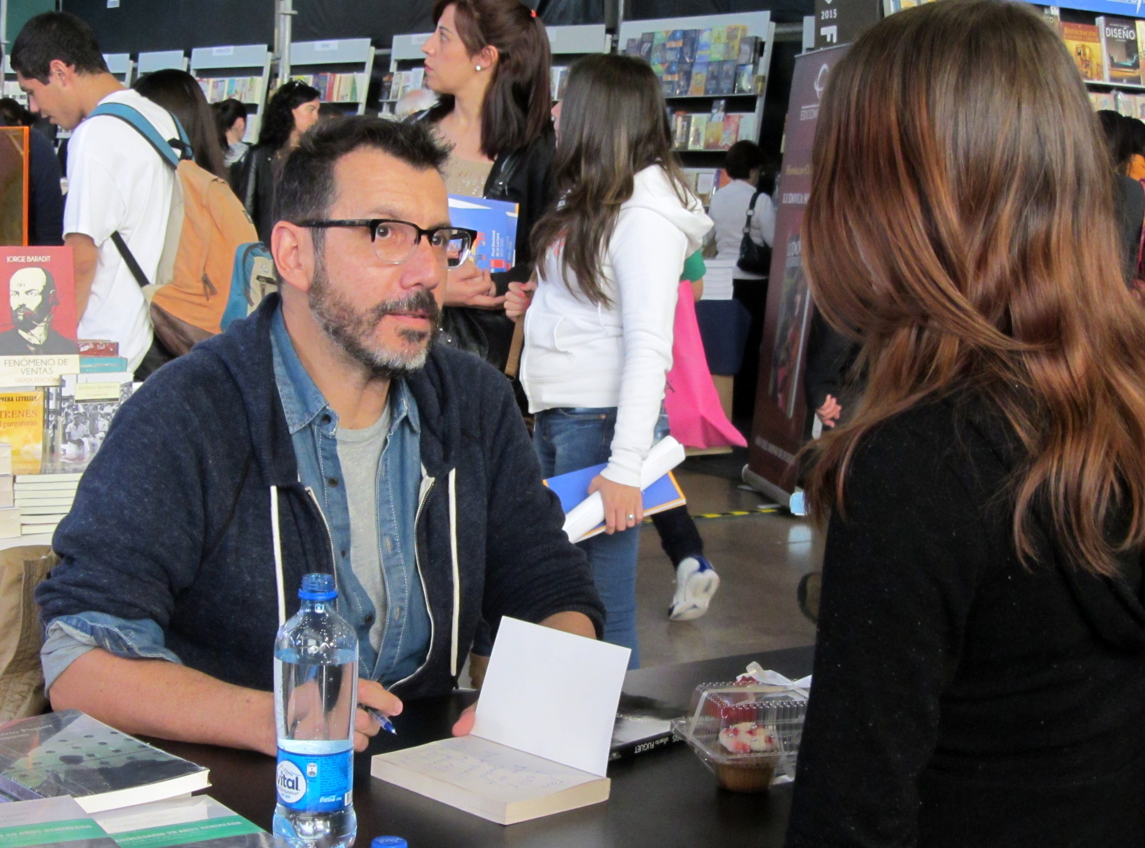 El escritor y cineasta chileno Alberto Fuguet en la Feria Internacional del Libro de Santiago 2015